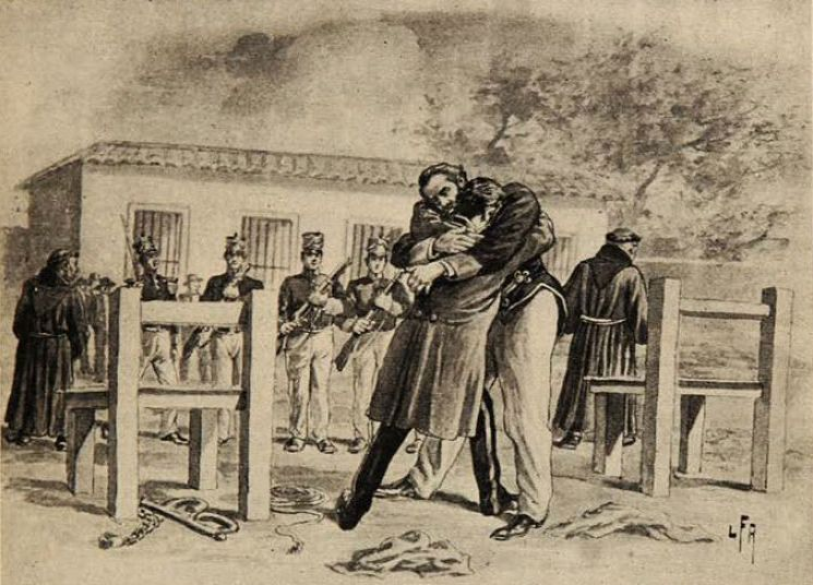 Los Hermanos Luis Carrera y José Luis Carrera y su último abrazo antes de ser fusilados en Mendoza, Argentina, 8 de abril de 1818.